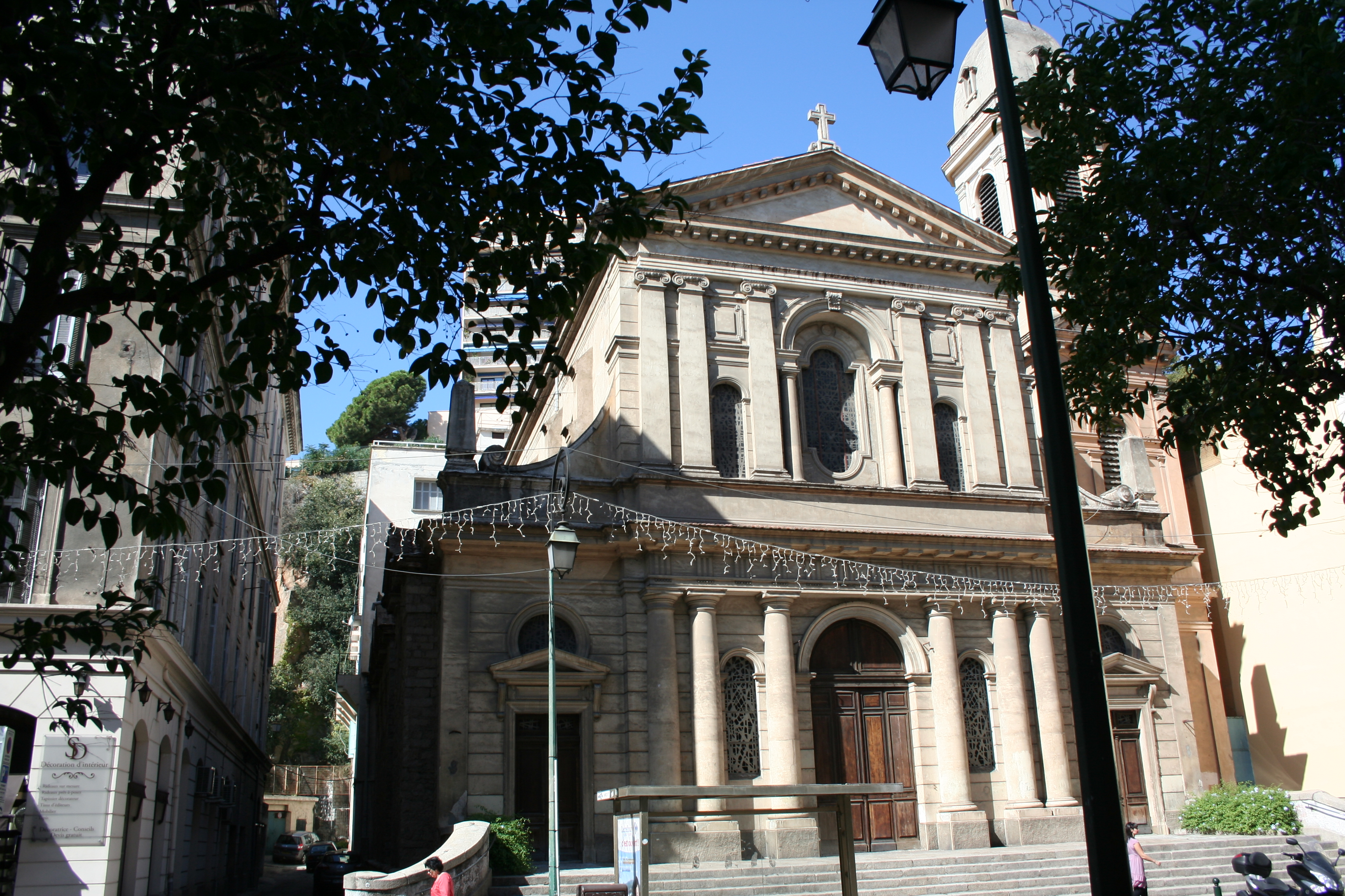 Église Saint-Roch à Ajaccio, Architecture néoclassique de l'architecte Barthélémy Maglioli (1885)